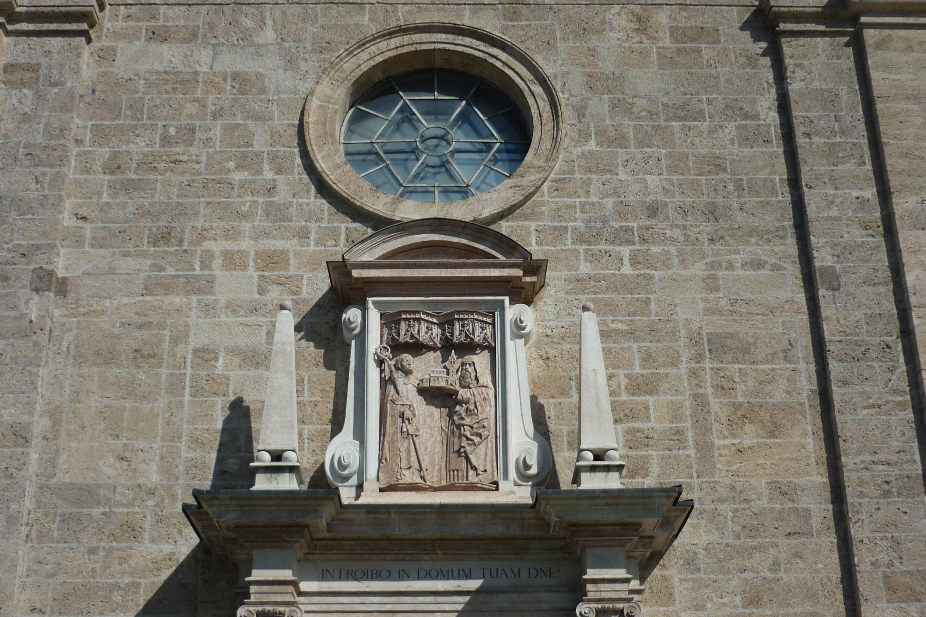 Relief an der Pfarrkirche St. Quirin in TegernseeThis is a photograph of an architectural monument.